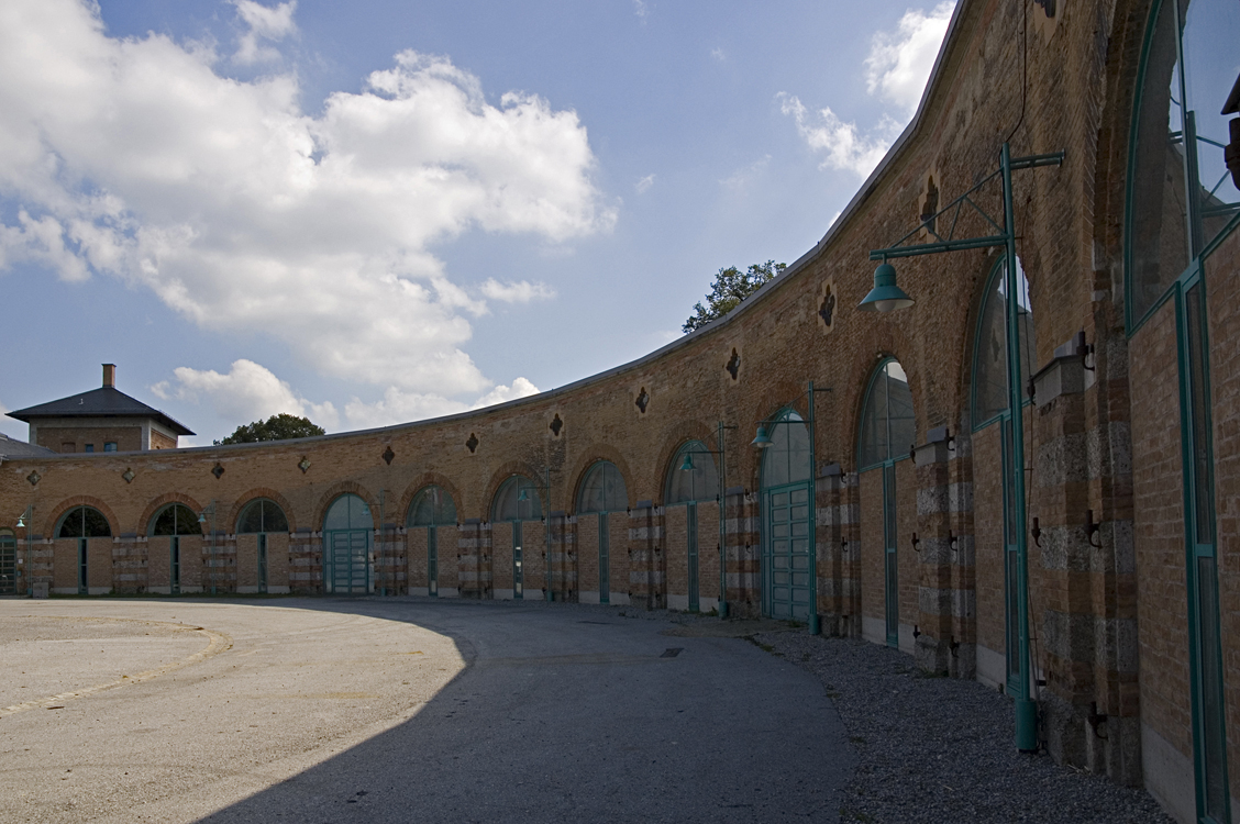 Altes Bahnbetriebswerk Rosenheim